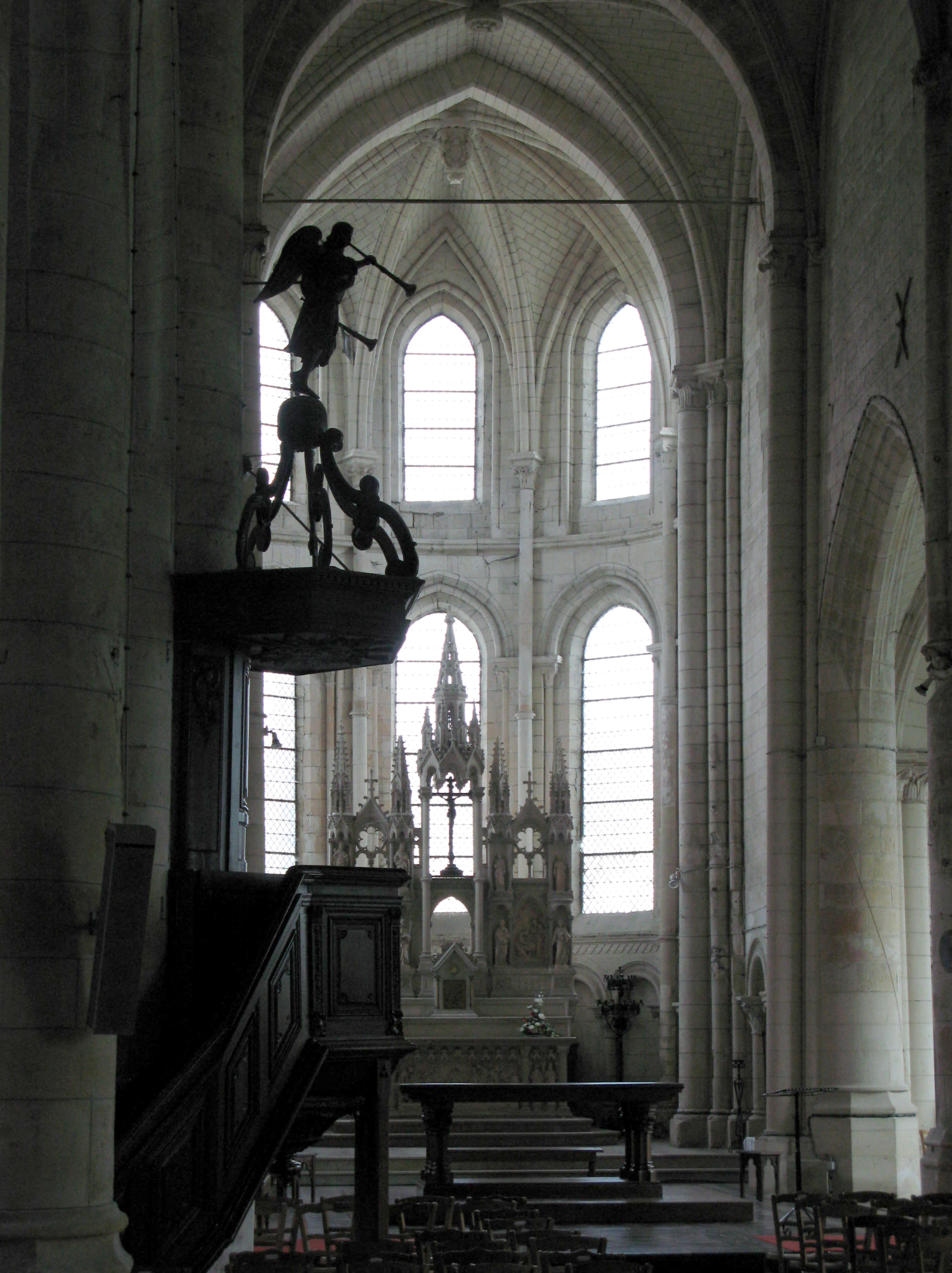 Bray-sur-Somme (Somme, France) - Intérieur de l'église avec la chaire.